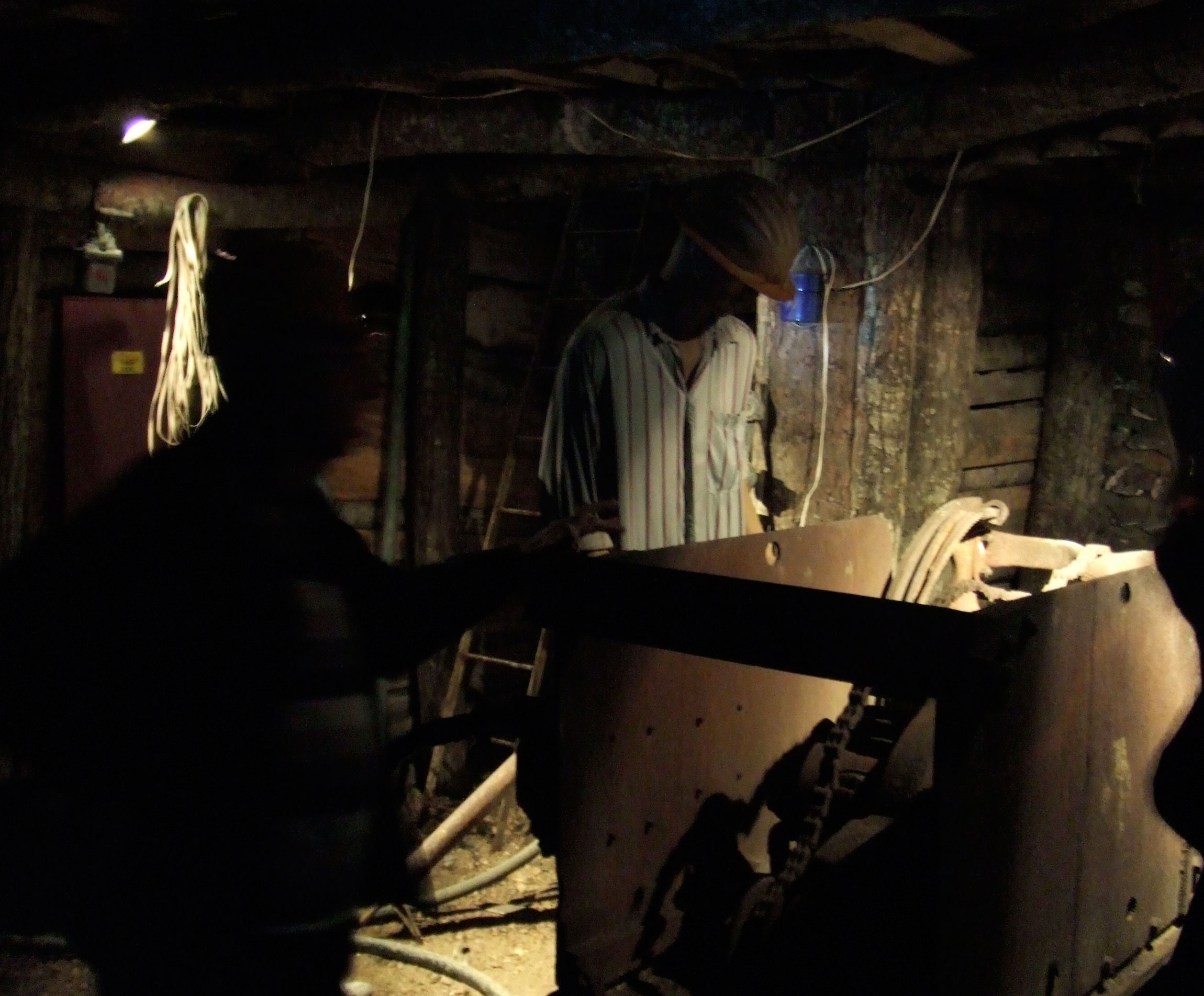 Galerie de mine de cinabre à Abbadia San Salvatore